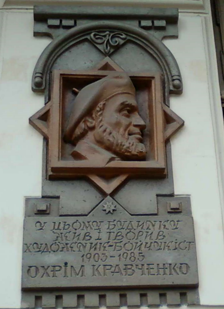 Мемориальная таблица украинского художника-бойчукиста Охрима Кравченко (1903-1985)во Львове.